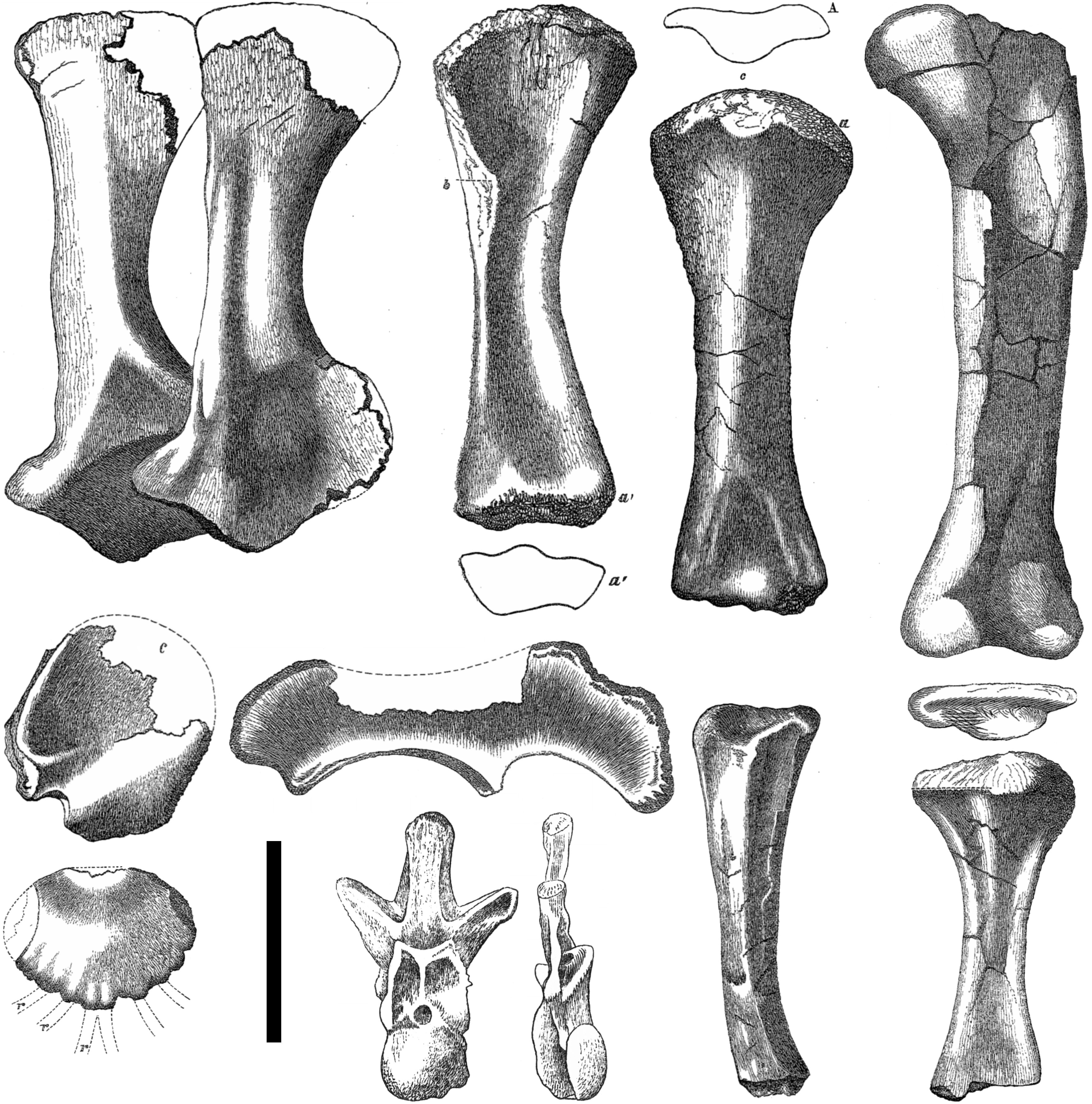 Cetiosaurus oxoniensis elements.